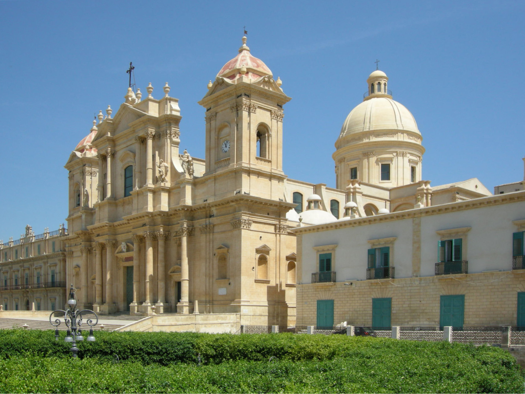 Noto, terrazza verso il duomo